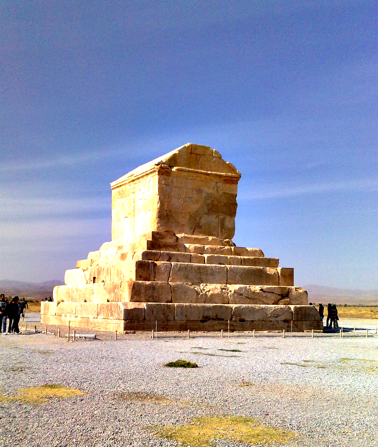 طواف